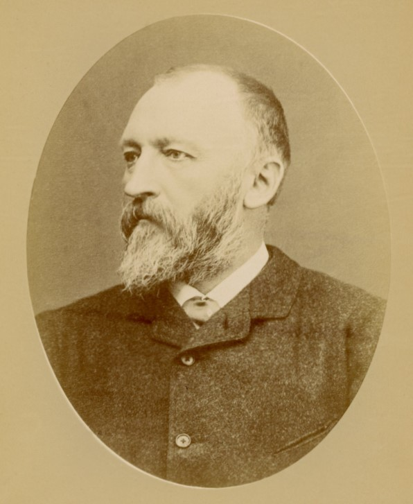 Auguste Scheurer-Kestner, Biographies alsaciennes avec portraits en photographie, série 1